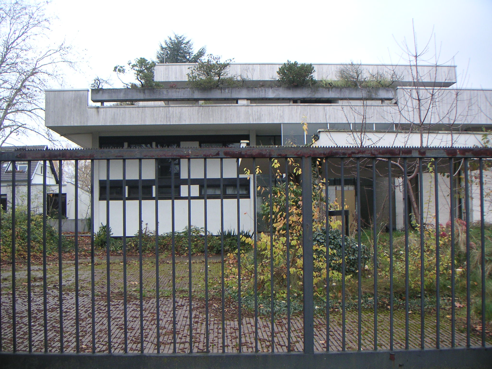 Ehemalige türkische Botschaft in Bonn-Mehlem, Utestraße 47/ Gernotstraße 5: Residenzgebäude (2012 Verkauf und Abriss und später Bau von Eigentumswohnungen auf dem Grundstück)